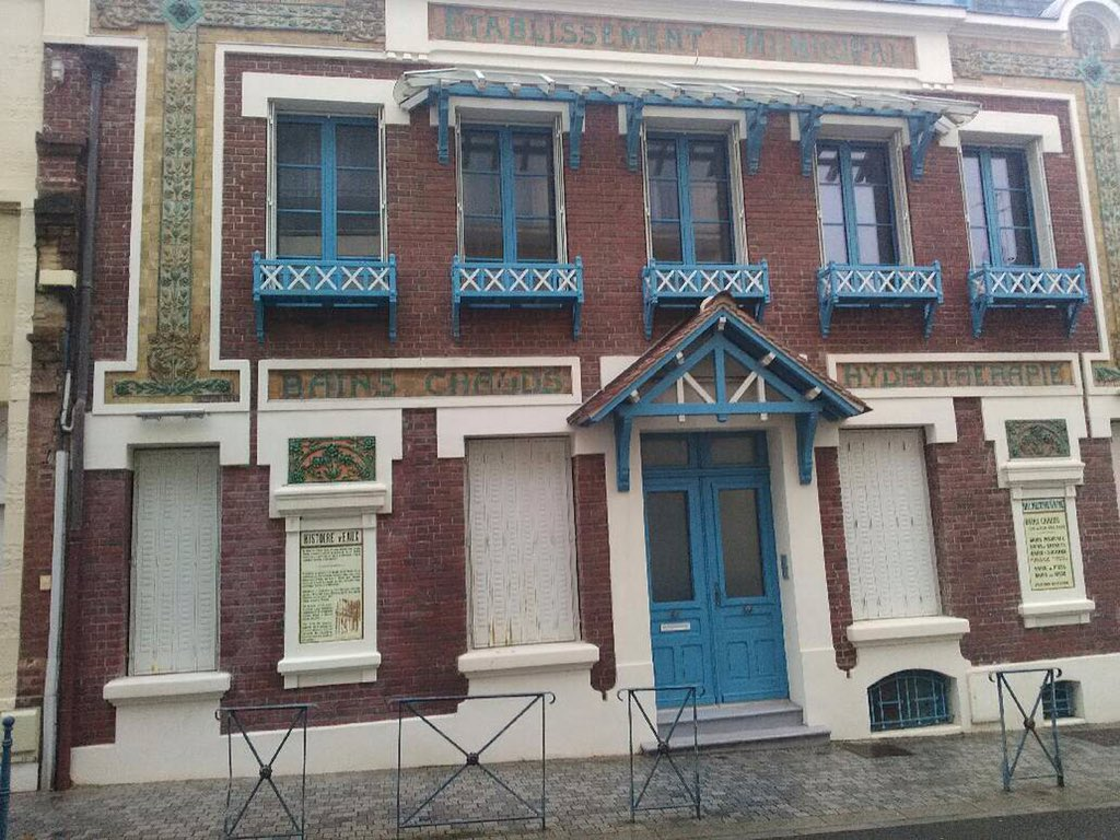 Ancien bâtiment de bains chauds rue Michel-d'Ornano, à Villers-sur-Mer (Calvados). Une plaque précise que le bâtiment date de 1913 et a été rénové pour ses 100 ans. Il fut transformé en garage dans les années 1950 et a subi plusieurs altérations, même si la restauration intérieure a préservé plusieurs éléments. Il s'agit du seul édifice témoignant du passé de l'activité balnéaire au sein d'un établissement de ce type au début du siècle dans la côte fleurie.